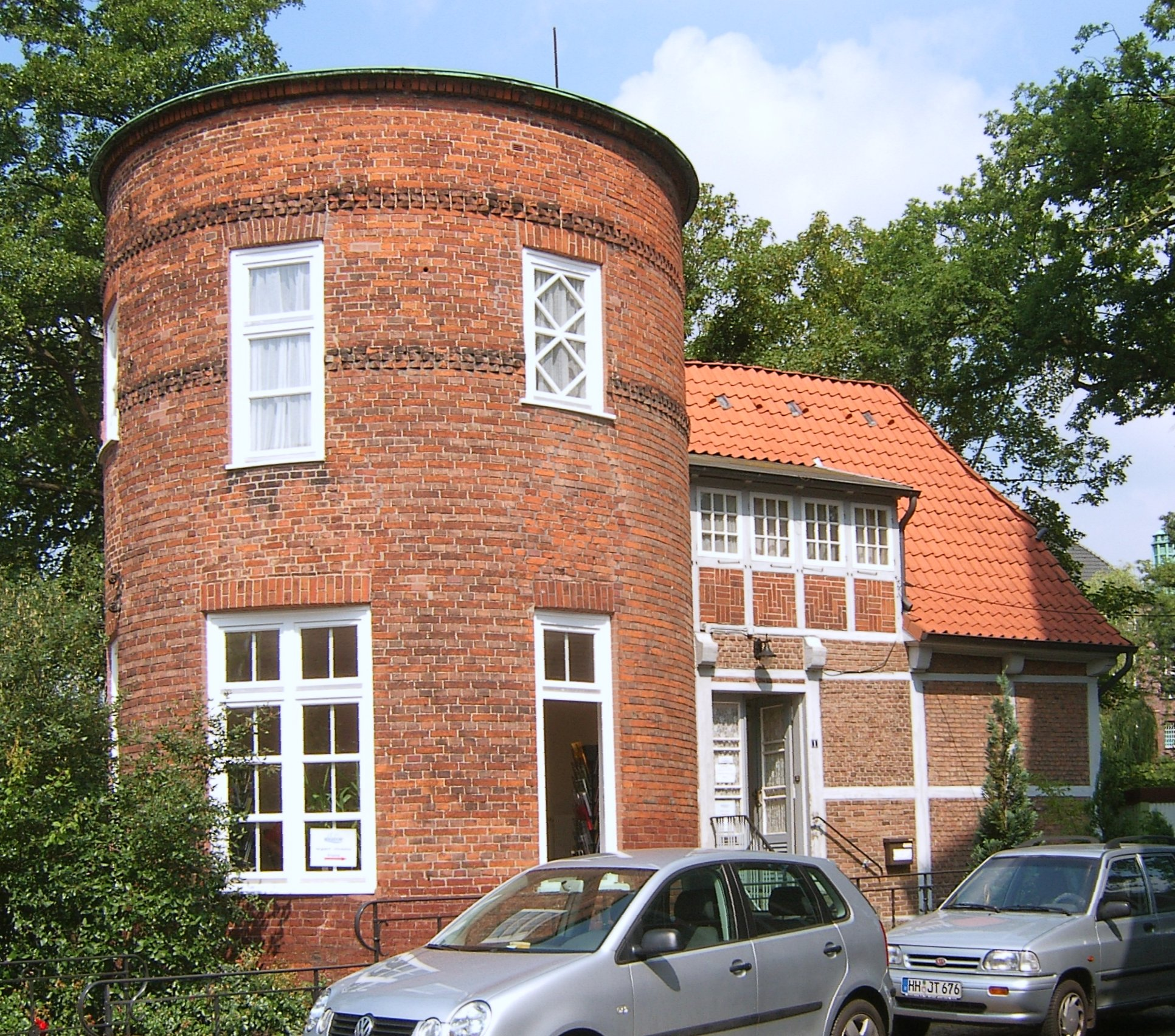 Hamburg-Bergedorf, Hasse-Haus This is a photograph of an architectural monument.